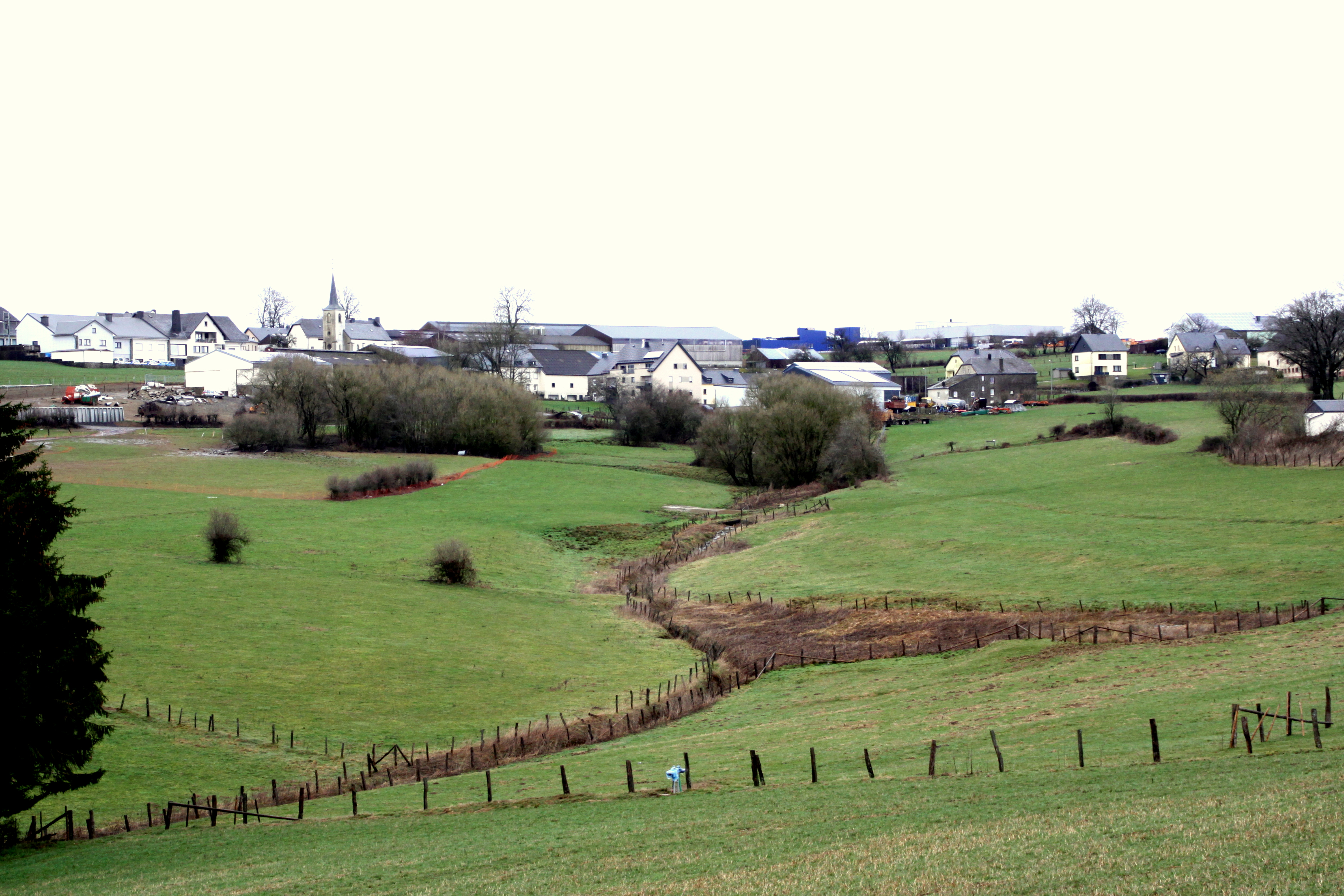 Quellgebitt vun der Fëschbech